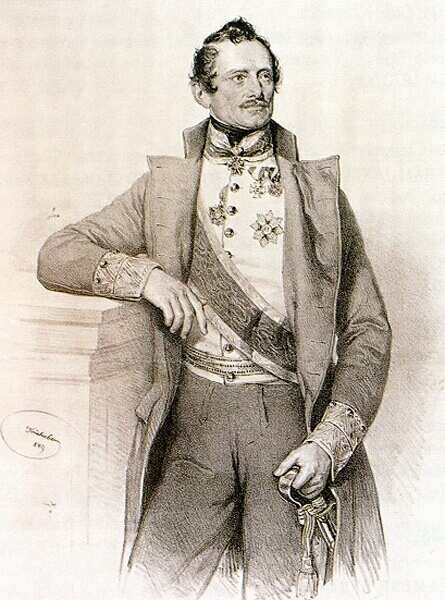 Puchner Antal (litográfia)